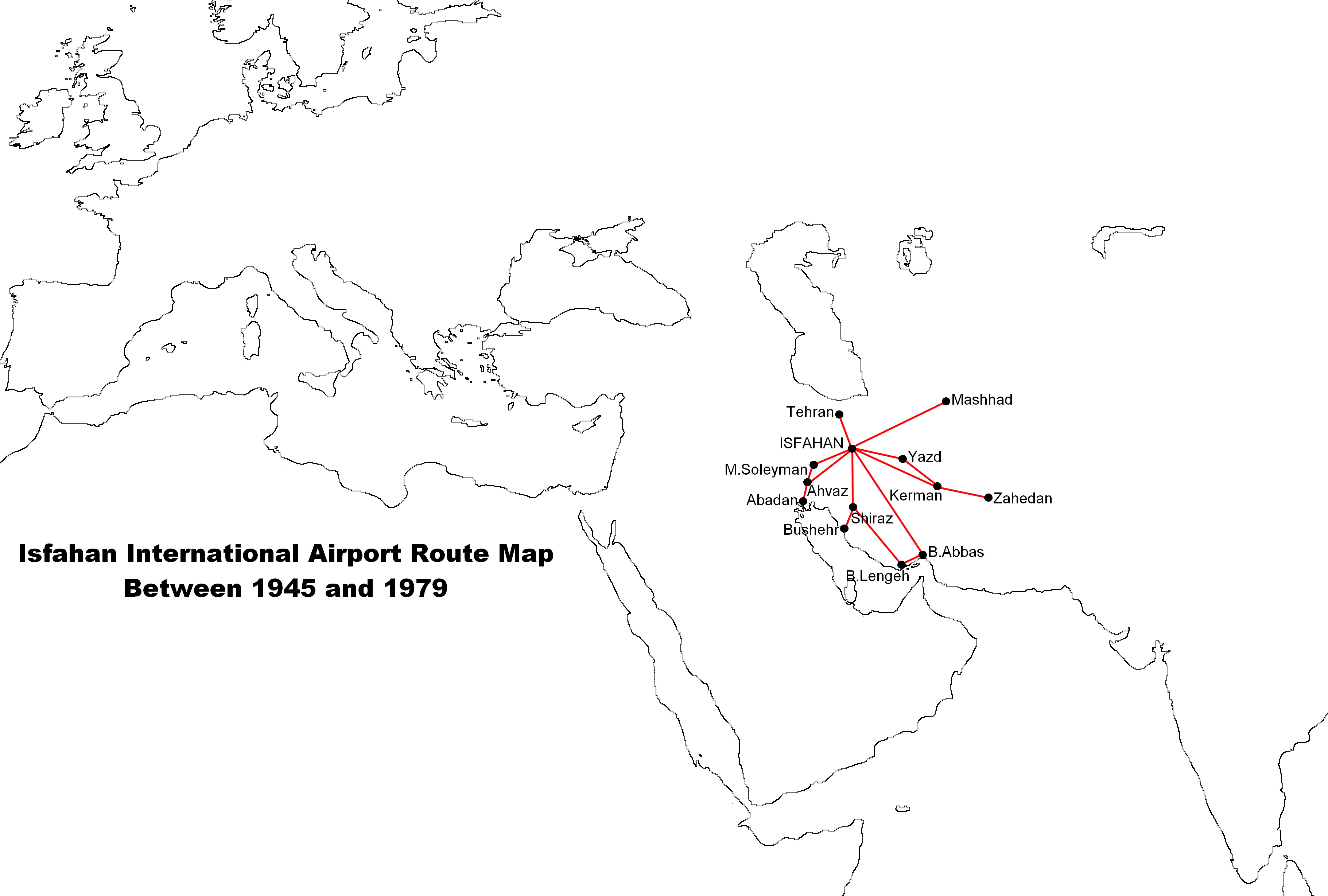 Isfahan airport